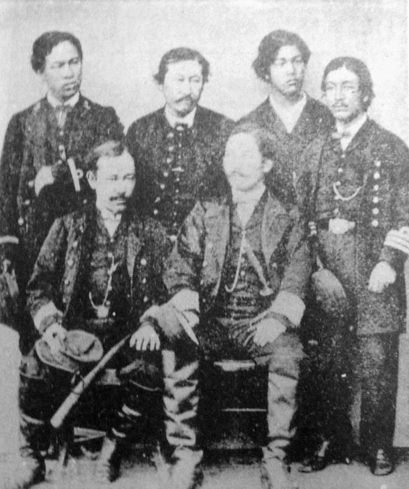 a Japanese man 榎本武揚, 荒井郁之助, 松岡磐吉, 林薫三郎, 榎本対馬, 小杉雅之進 (Takeaki Enomoto, Ikunosuke Arai, Bankichi Matsuoka...etc)